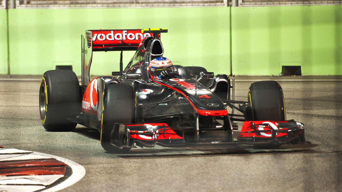 Photography By : Dhonsky